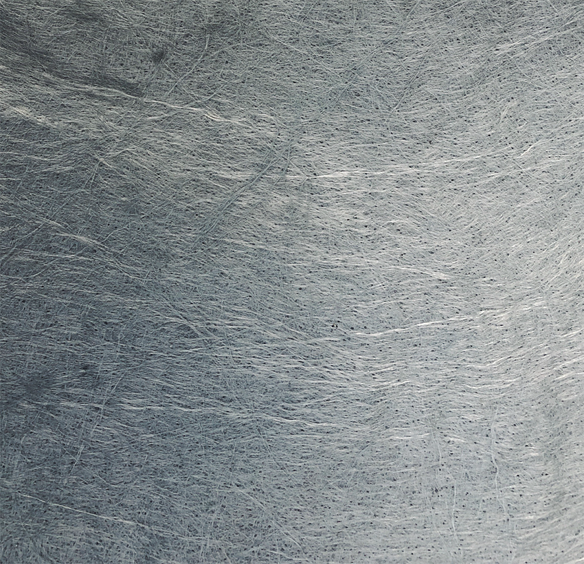 Geotêxtil de fibras contínuas, fabricado 100% em Poliéster (PS) pela Bidim.